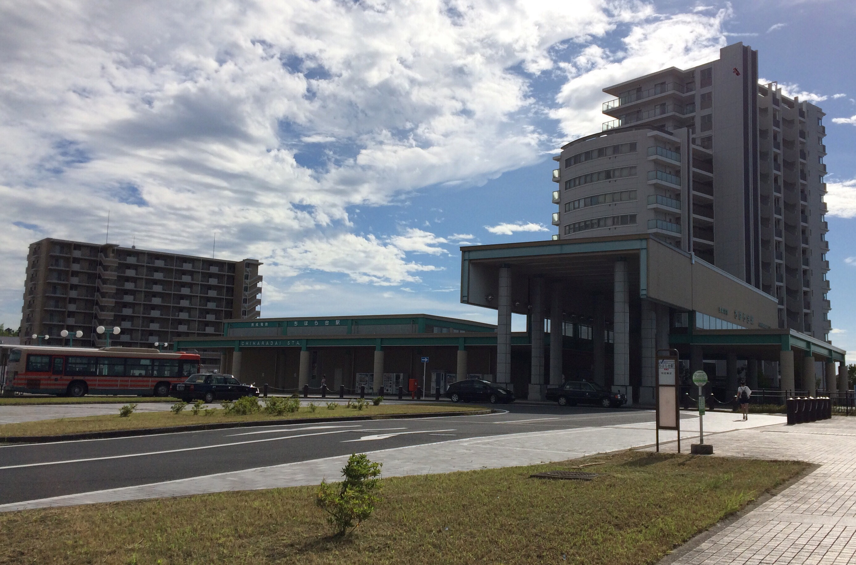 ちはら台駅舎